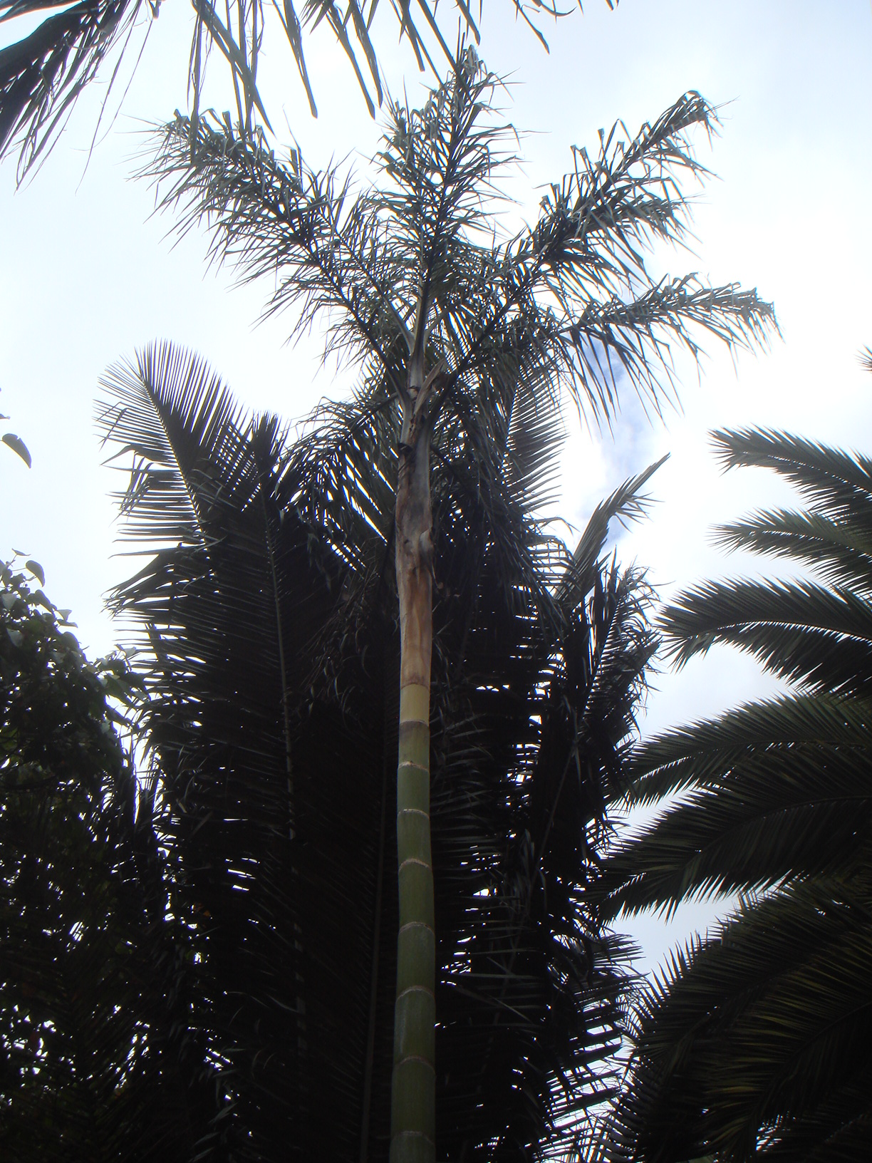 Palma negra (Ceroxylon vogelianum) Jardín Botánico de Bogotá, Colombia.